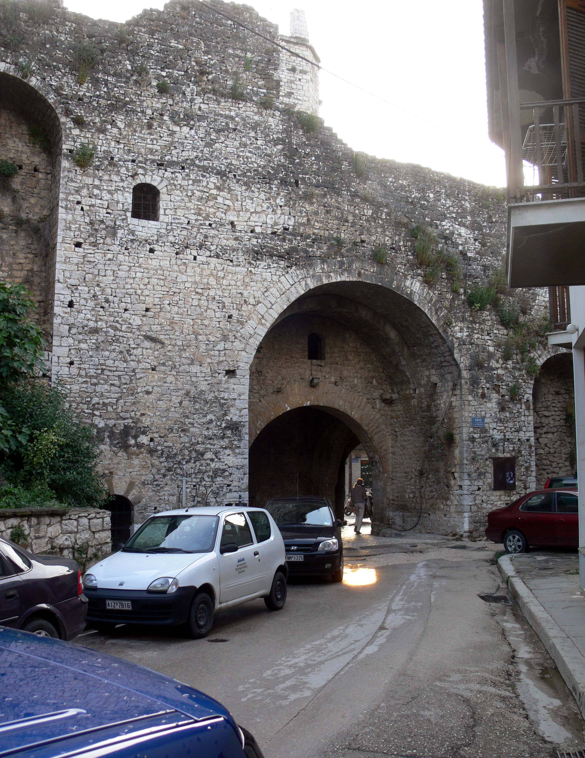 Kastro von Joannina